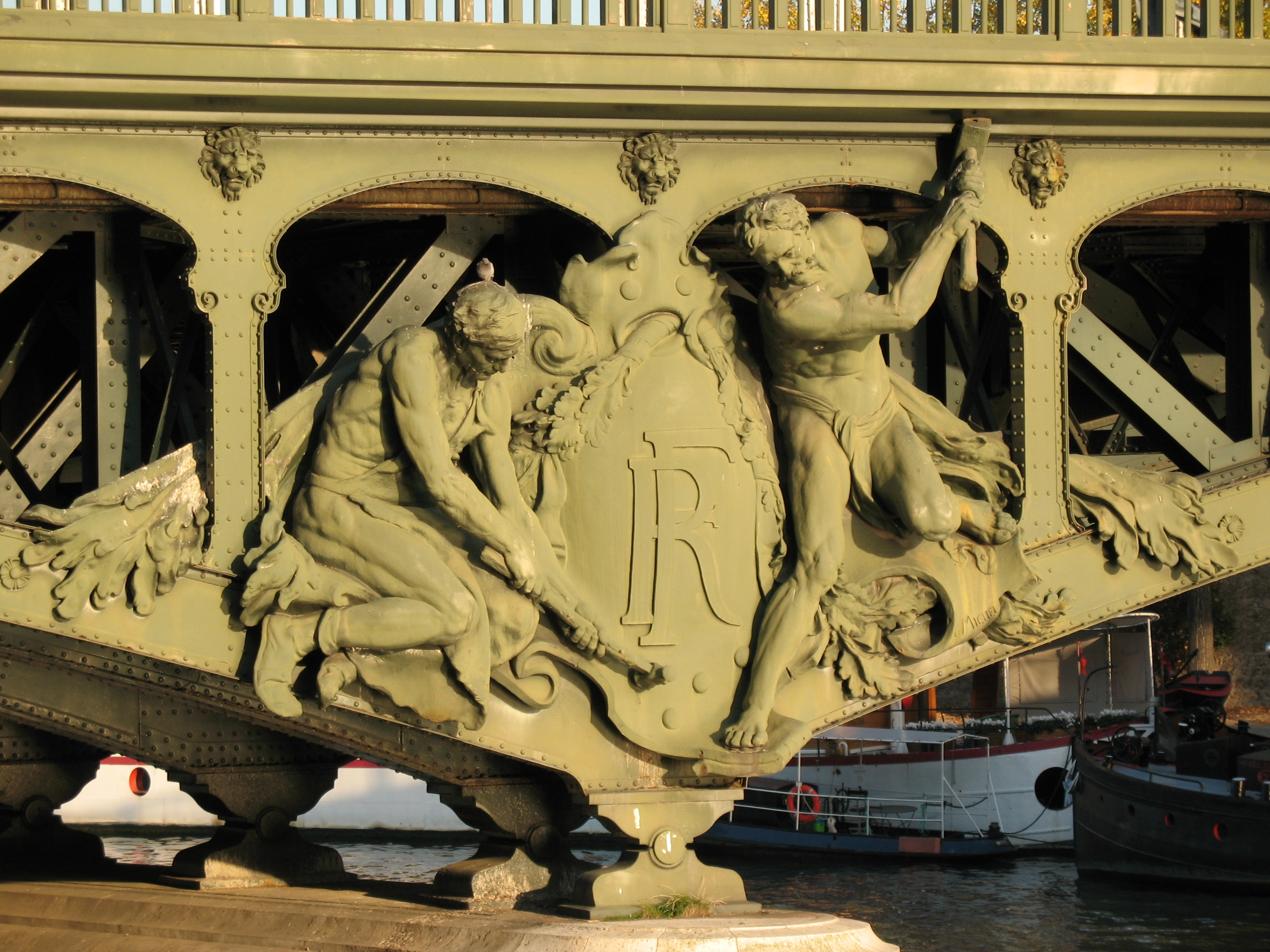 Les forgerons riveteurs, by Gustave Michel, pont de Bir-Hakeim, Paris Picture : Gérard Delafond